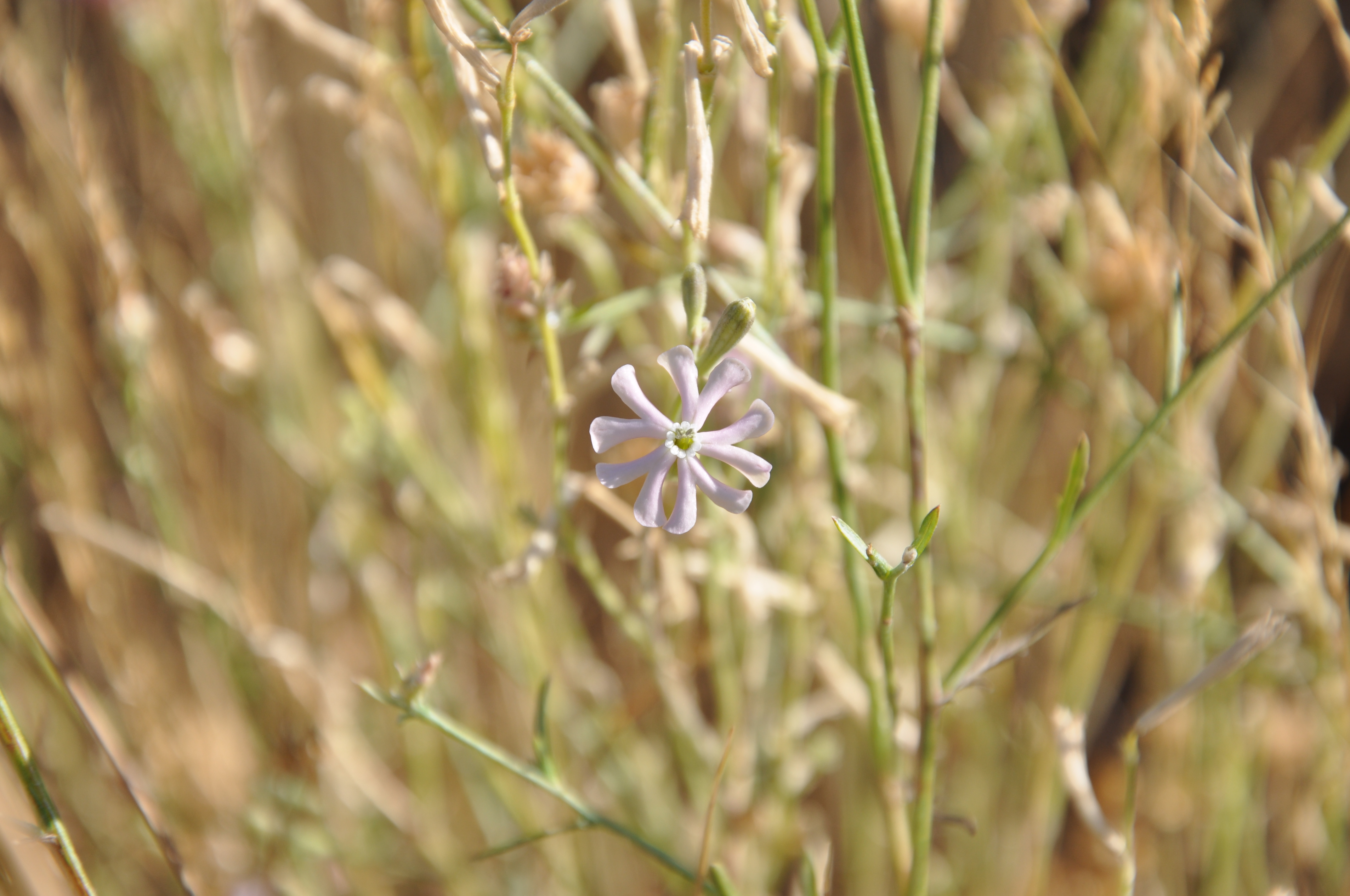 Silene leonesa (Silene legionensis), La Torre-Ávila, España.